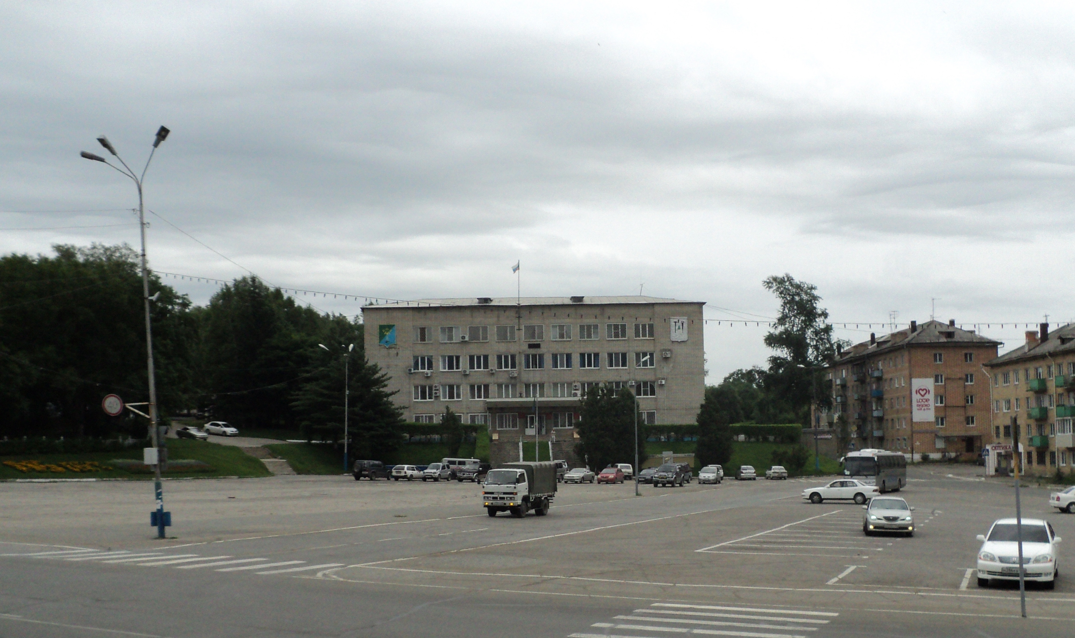 Здание администрации Партизанского городского округа